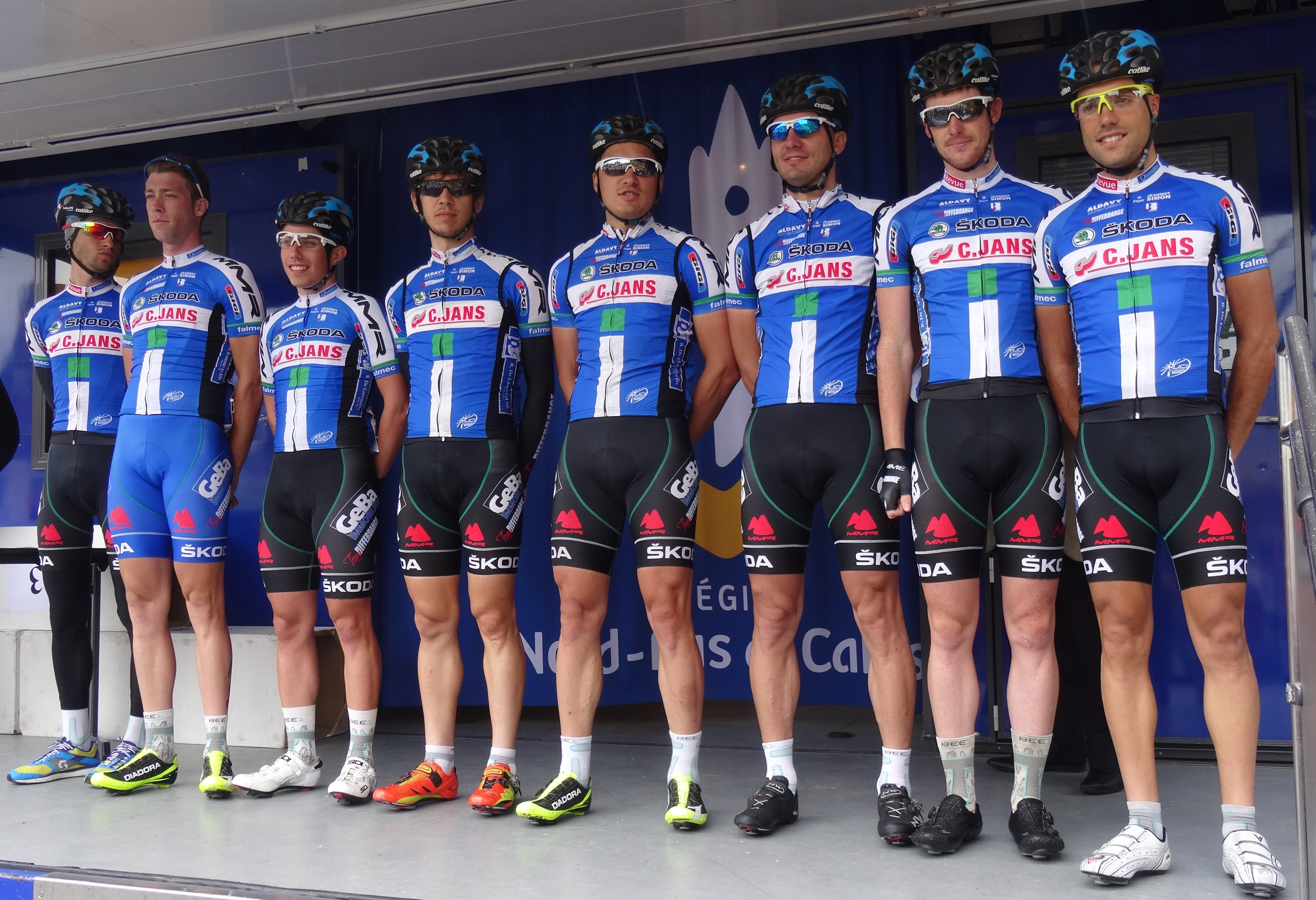 Reportage photographique réalisé le dimanche 13 juillet à l'occasion du départ et de l'arrivée de la Ronde pévéloise 2014 à Pont-à-Marcq, Nord-Pas-de-Calais, France.